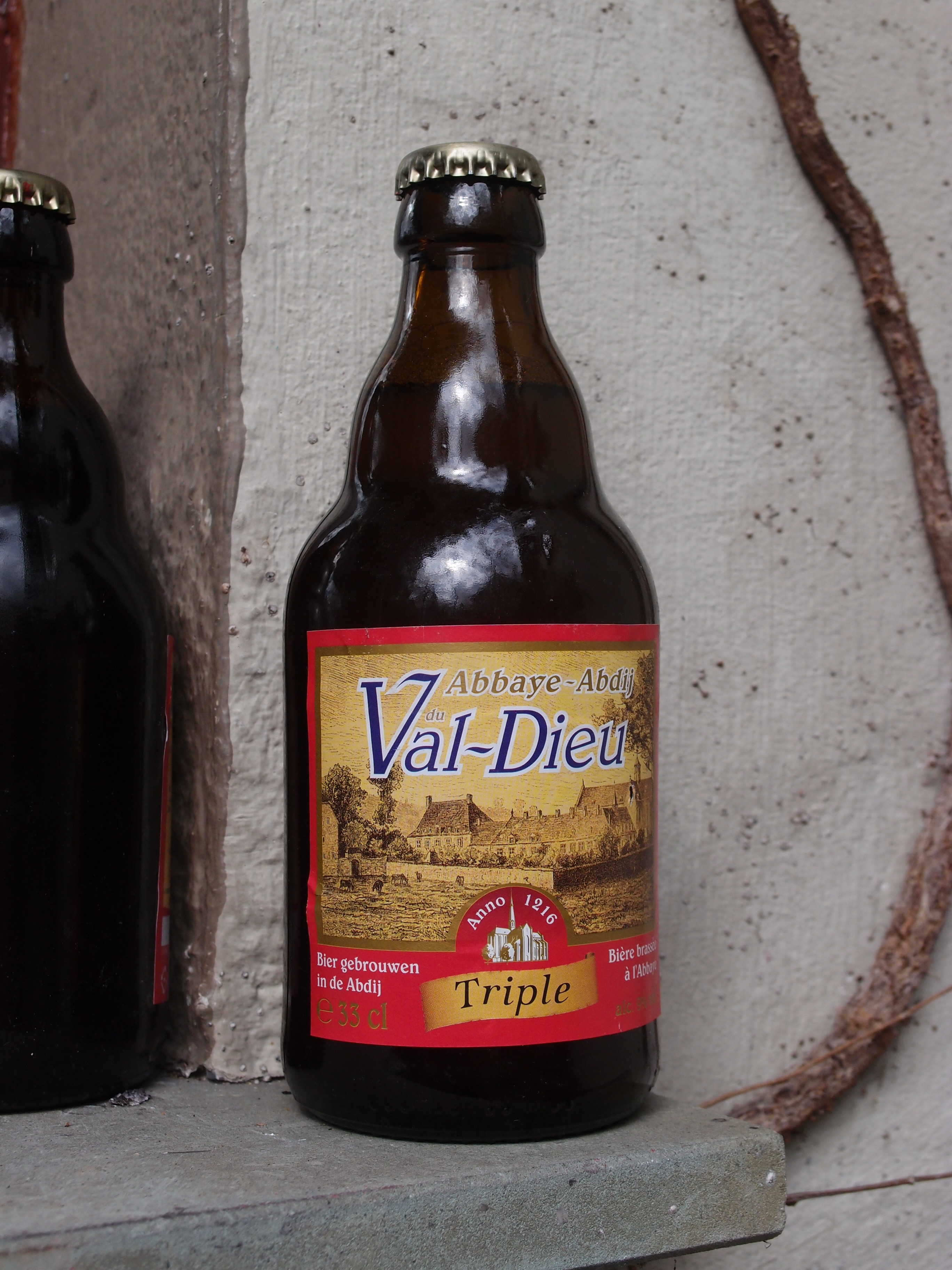 Val-Dieu Triple (belgisches Starkbier (Blonde)) Datum: 07.04.2012 Urheber: M. Pfeiffer alias Benutzer:Gordito1868 Quelle: privates Fotoarchiv des Urhebers Garantieerklärung des Urhebers: es handelt sich um ein authentisches Originalfoto, das nicht via Fotomanipulation verändert wurde